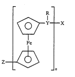 polímer de ferrocè